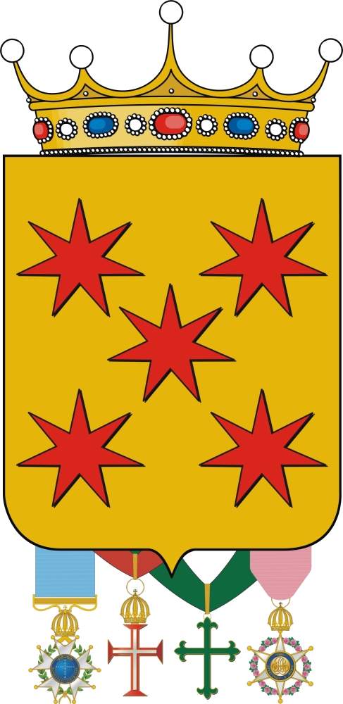 De ouro, com cinco estrelas de vermelho de sete raios, postas em aspa. Pleno dos Fonsecas. Coroa de Visconde. Medalhas: Oficial da Ordem do Cruzeiro, Comendador da Imperial Ordem de Cristo e de São Bento Aviz e Oficial da Imperial Ordem da Rosa.